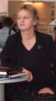 Elke Heidenreich Fotograf: Hans Weingartz (Leonce49) Aufnahme: Oktober 2007 (Frankfurter Buchmesse) Url